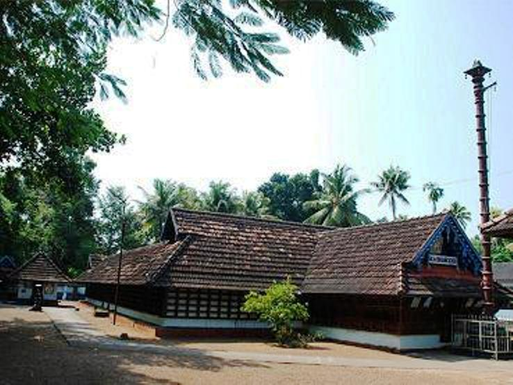 പരിപ്പ് മഹാദേവക്ഷേത്രം, പരിപ്പ്, അയ്മനം, കോട്ടയം ജില്ല